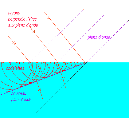 Schéma : réfraction, modèle d'Huygens des ondelettes (Schéma personnel ; réalisé à partir de l'appliquette de W. Fendt et Y. Weiss : Catégorie:Schéma de physique